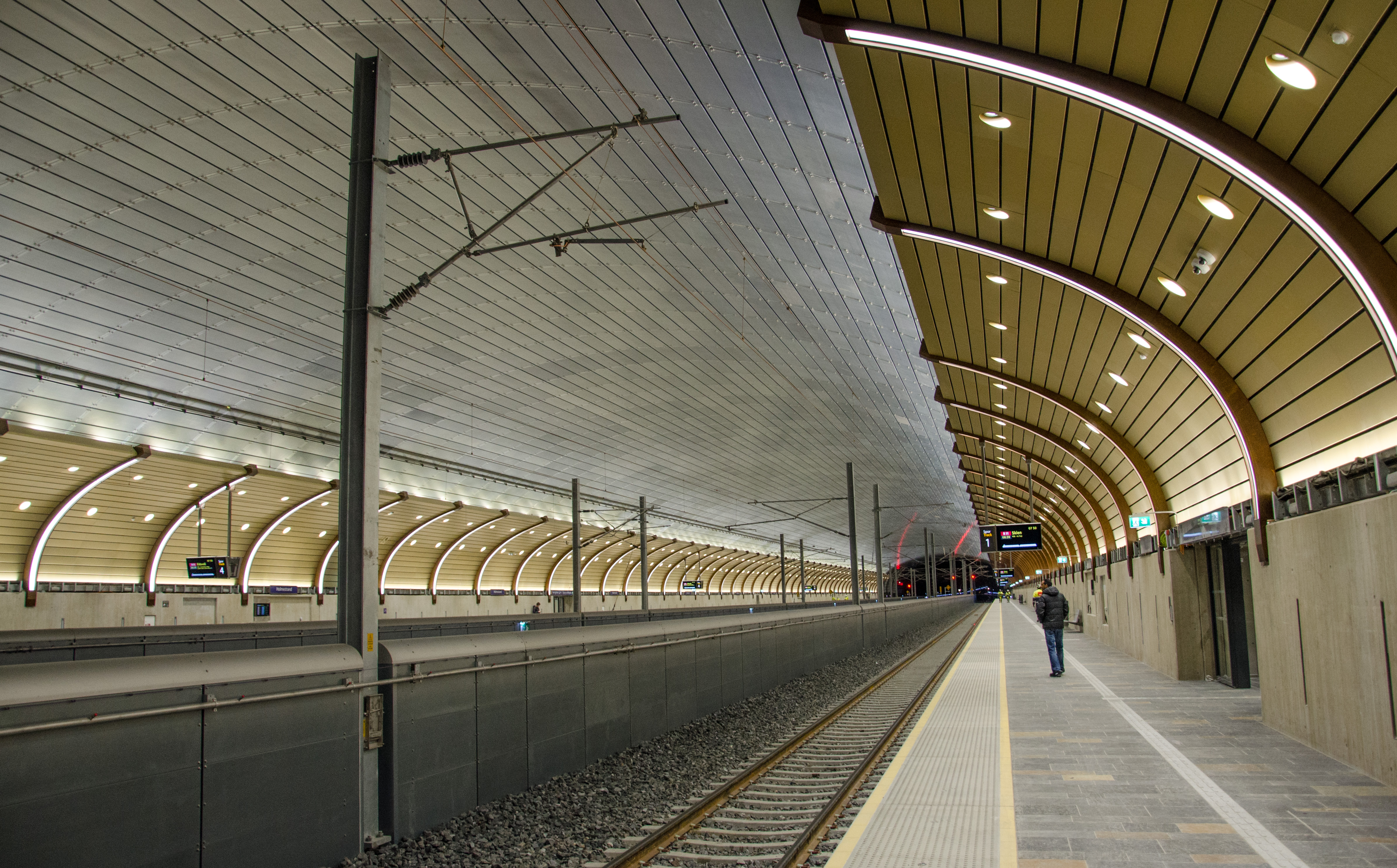 Holmestrand stasjon